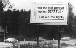 Billboard